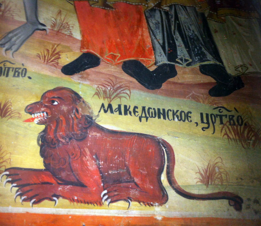 Дел од фреска на македонски лав и натпис Македонско Царство во црквата „Св.Великомаченик и Победоносец Ѓоргија“ од XVI век, во селото Бањани кое се наоѓа во подножјето на Скопска Црна Гора.